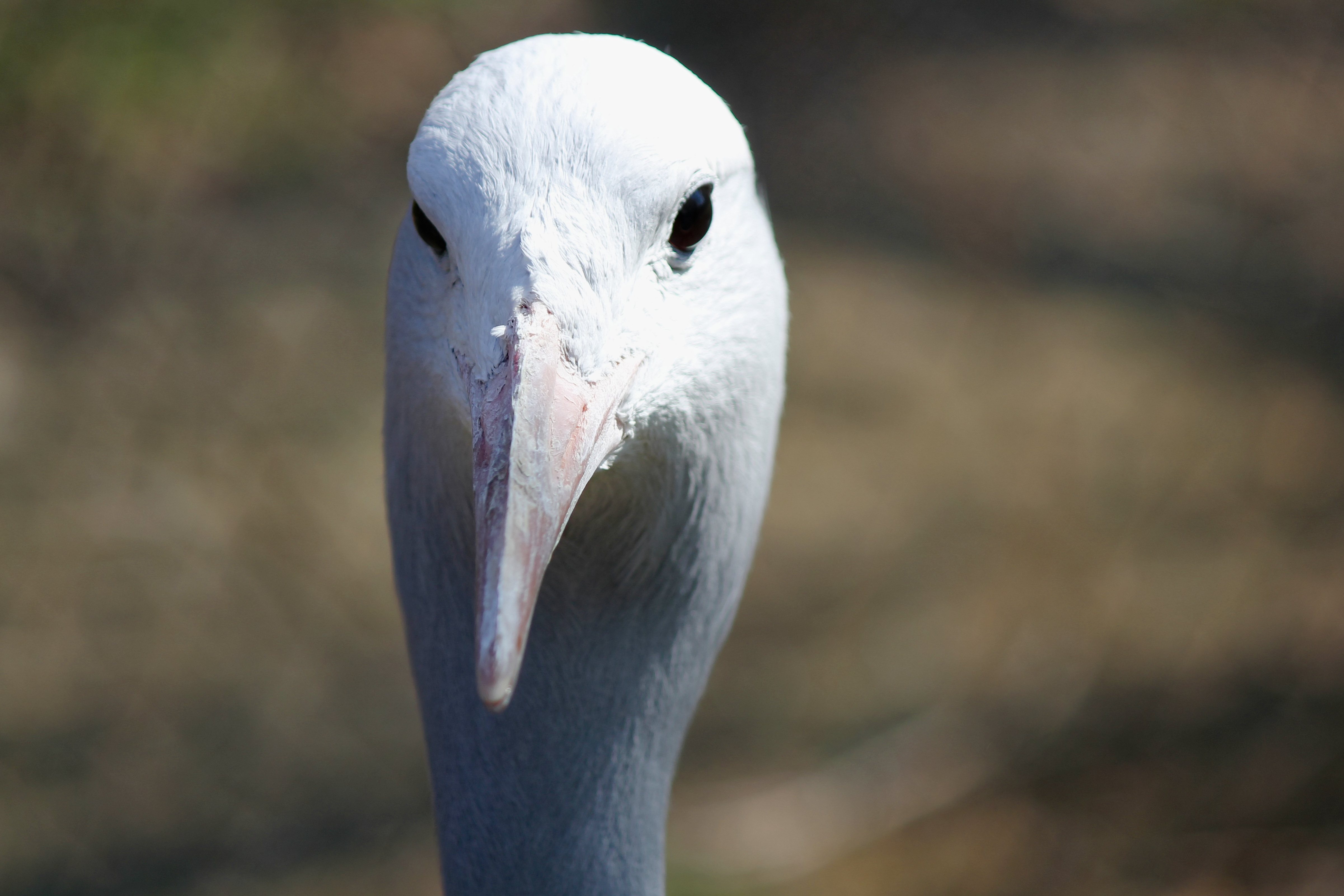 Hlava jeřába rajského zblízka